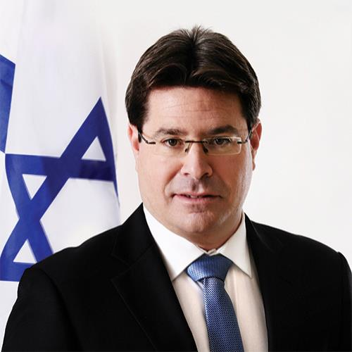 אופיר אקוניס, תמונה רשמית